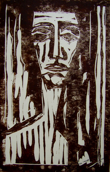 Alfons Anders "Junger Mann" Holzschnitt